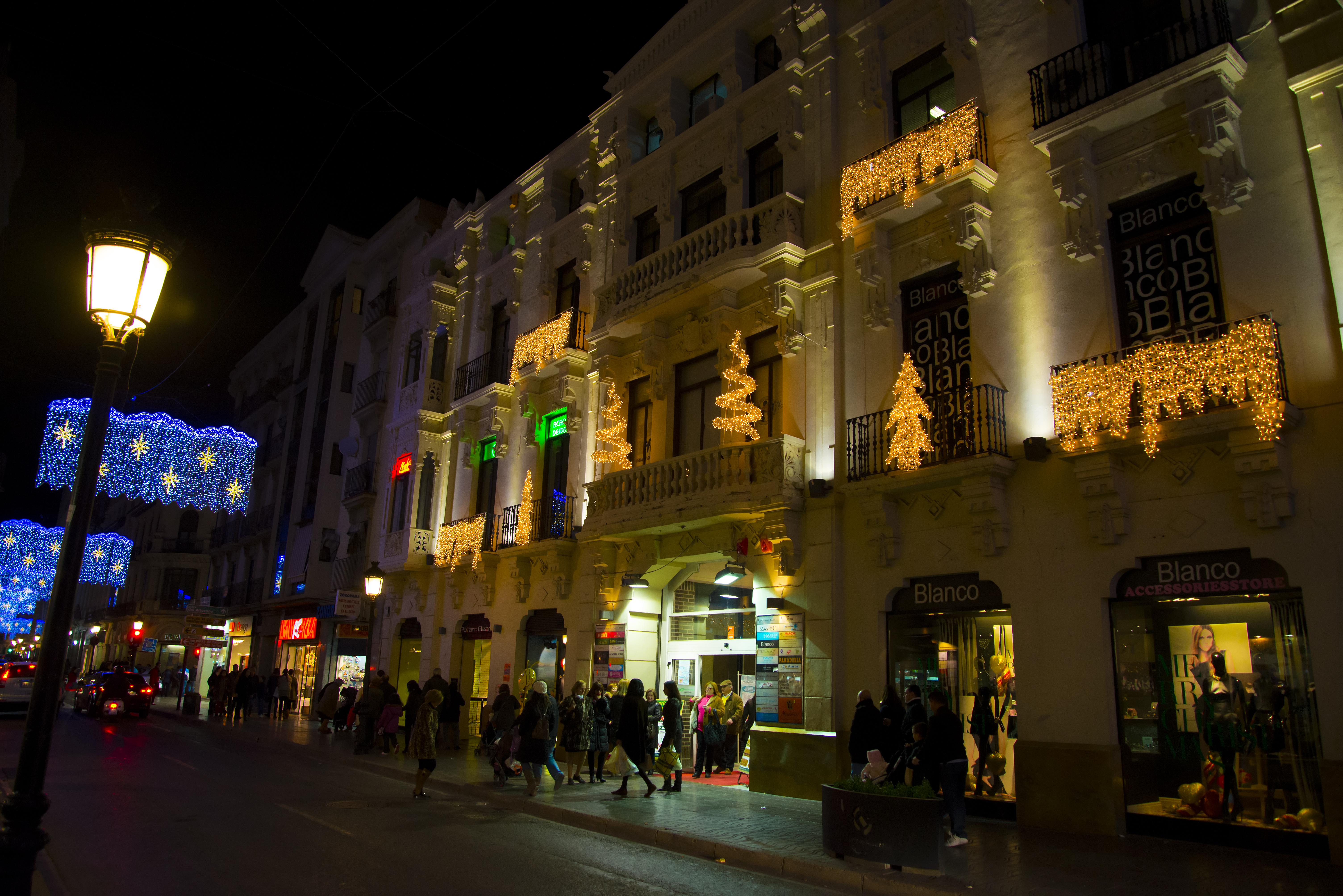 Albacete nocturno